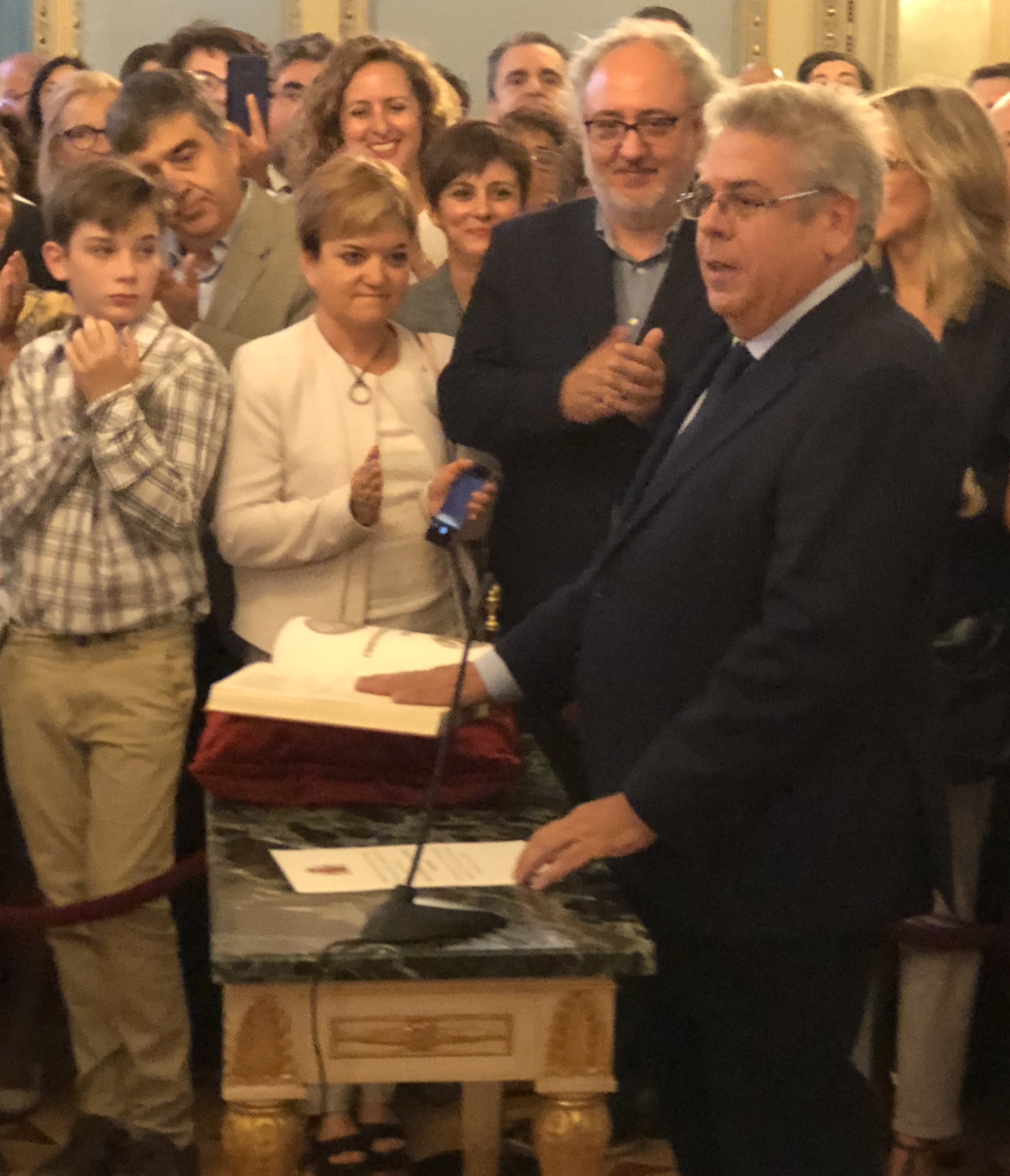 Toma de posesión como Secretario de Estado de Política Territorial. Ministerio de Política Territorial y Función Pública